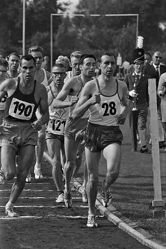 Beverwijk - een beeld tijdens de 10000 meter heren op de tweede dag van de nationale atletiekkampioenschappen in beverwijk. Winnaar van dit nummer werd joep delnoye ( nr 28). Gevolgd door j. Schooltink (115)